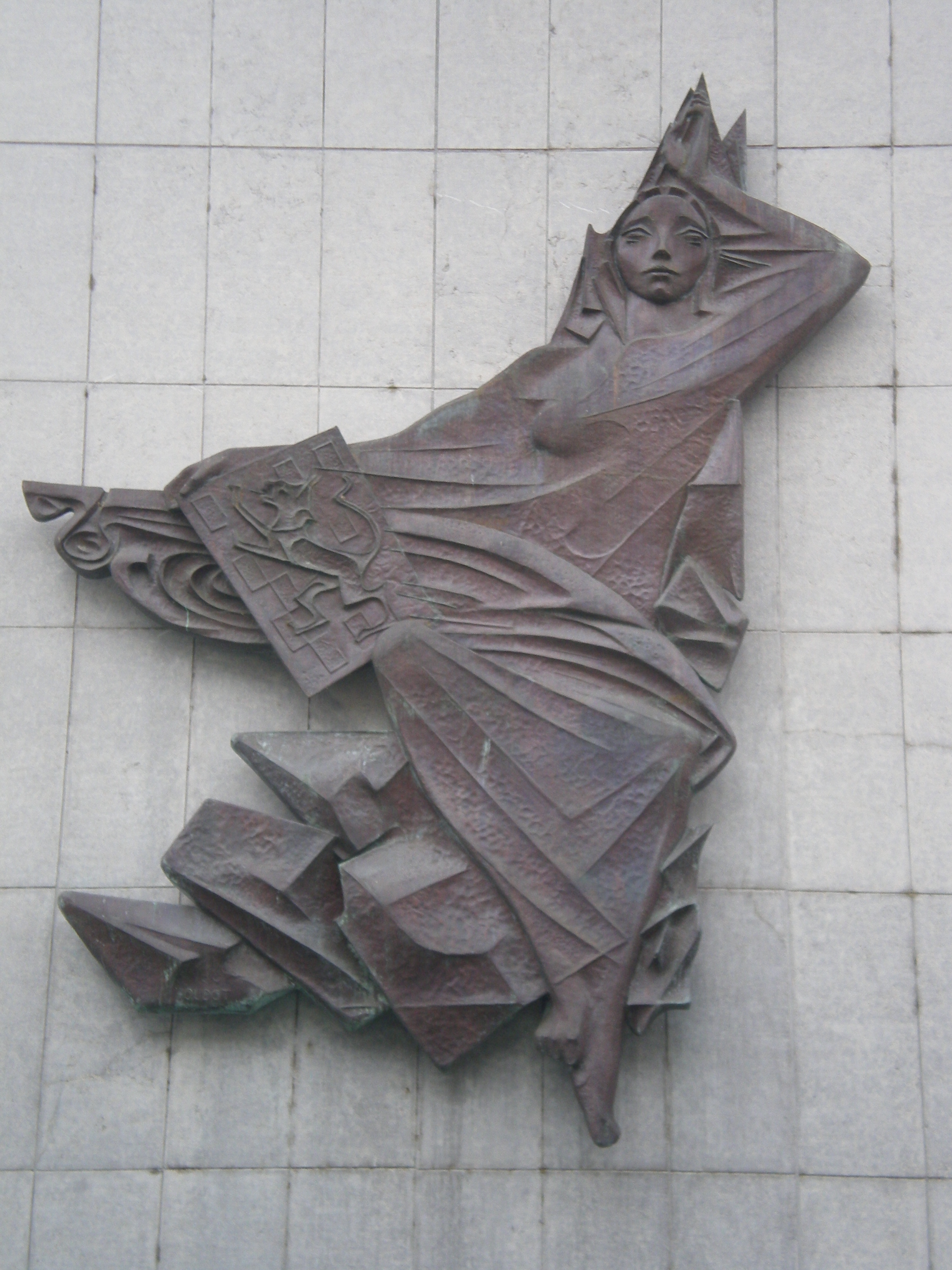 Fresque